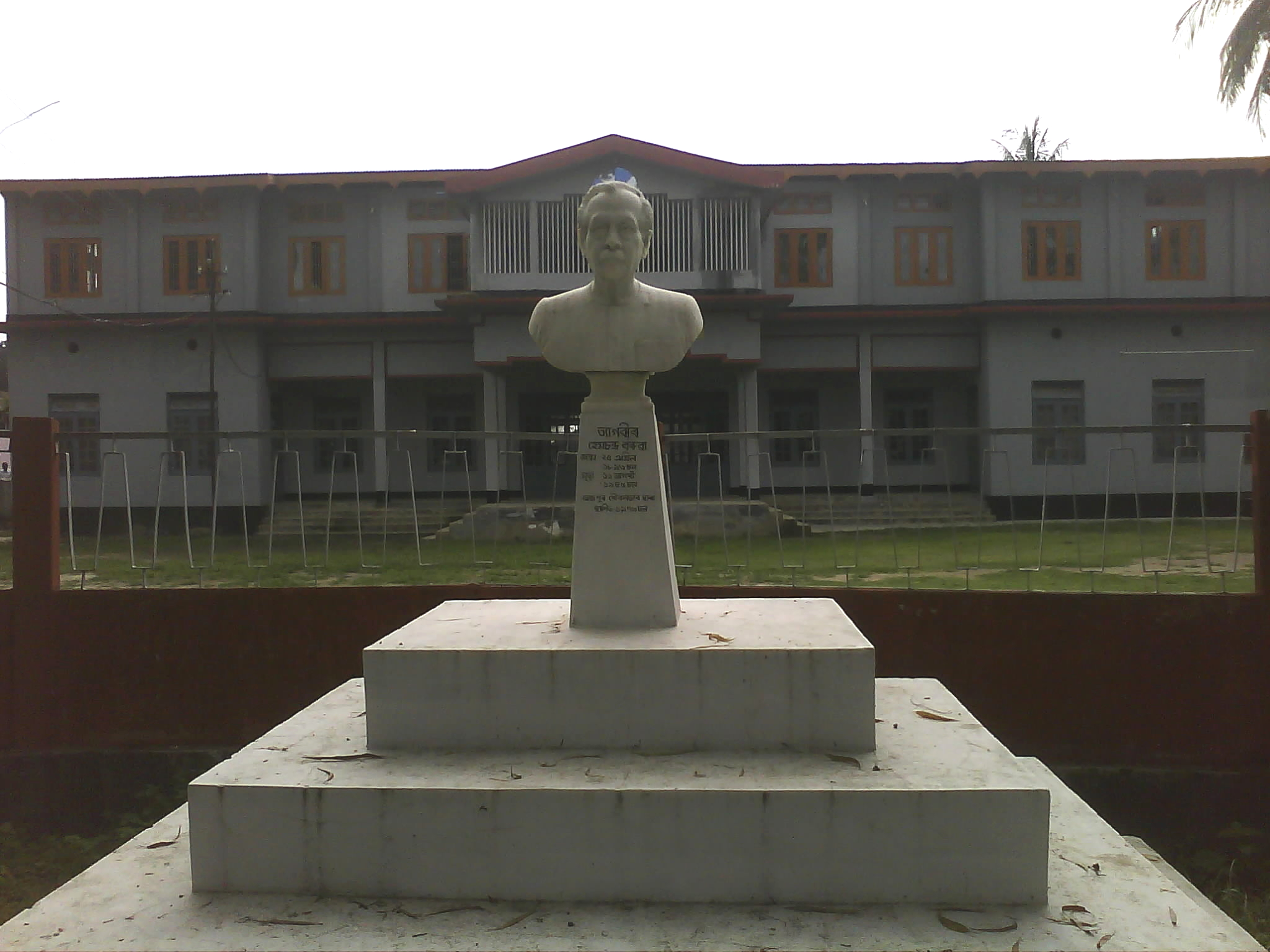 অসমীয়া: হেমভৱনৰ সন্মূখত থকা ত্যাগবীৰ হেমচন্দ্ৰ বৰুৱাৰ আৱক্ষ মূৰ্ত্তি, স্থান, তেজপুৰ (অসম)